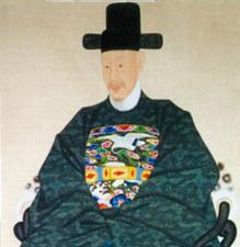 허적 영정